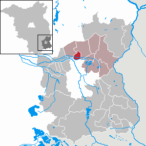 Drehnow in Brandenburg (Country) - District Spree-Neiße